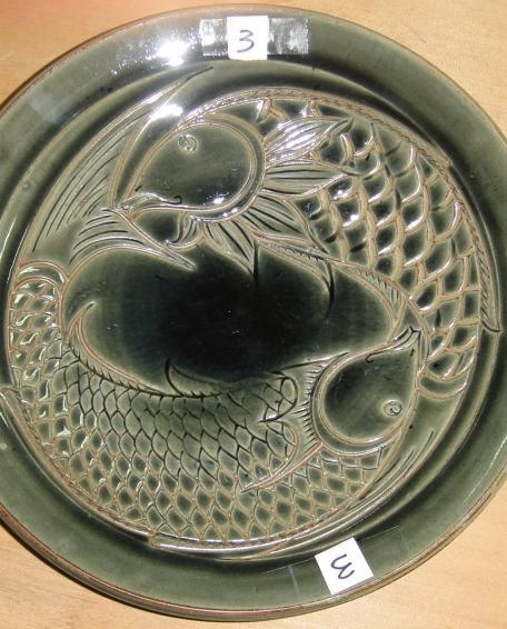 宮城三成 線彫魚紋大皿(2008)